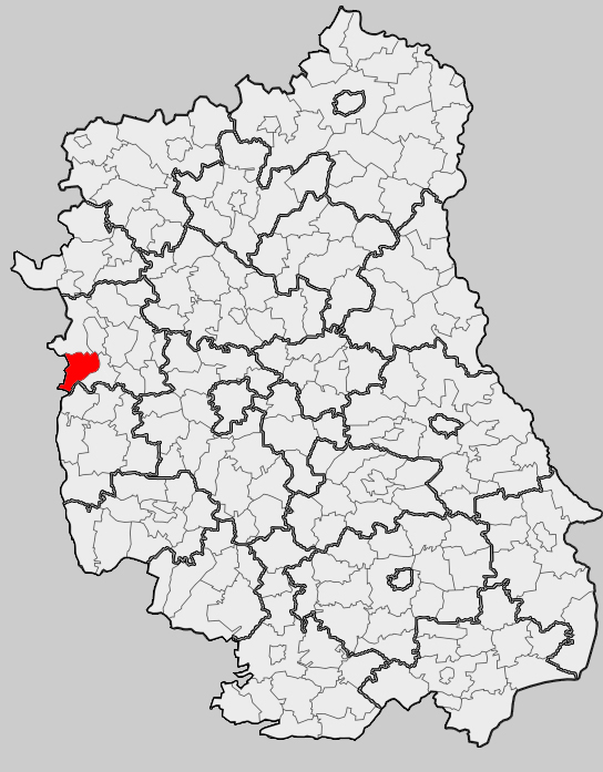 Map of gmina Janowiec, Puławy county, Lublin voivodship Mapa gminy Janowiec, powiat puławski, województwo lubelskie